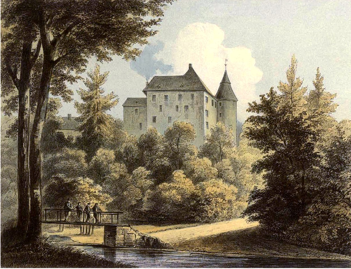 Eyneburg